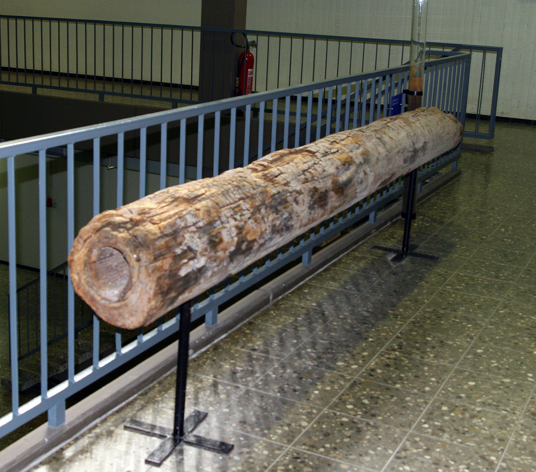 Historische Wasserleitung aus Holz ausgegraben in Durlach, zu sehen im Wasserwerk Elchesheim-Illingen